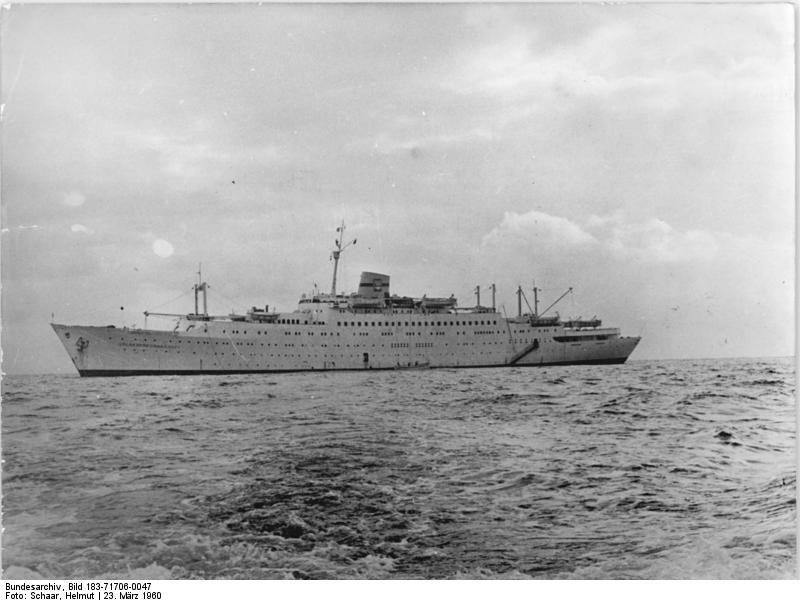 Zentralbild Schaar-23.3.1960 Erste Fahrt des FDGB-Urlauberschiffes "Völkerfreundschaft". Ende Februar 1960 startete das erste FDGB-Urlauberschiff "Völkerfreundschaft" zu einer 27tägigen Ferienreise von Rostock aus ins Mittel- und Schwarze Meer. UBz: Die "Völkerfreundschaft" auf ihrer ersten Fahrt mit Urlaubern an Bord.